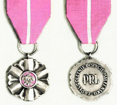 Medal Za Długoletnie Pożycie Małżeńskie